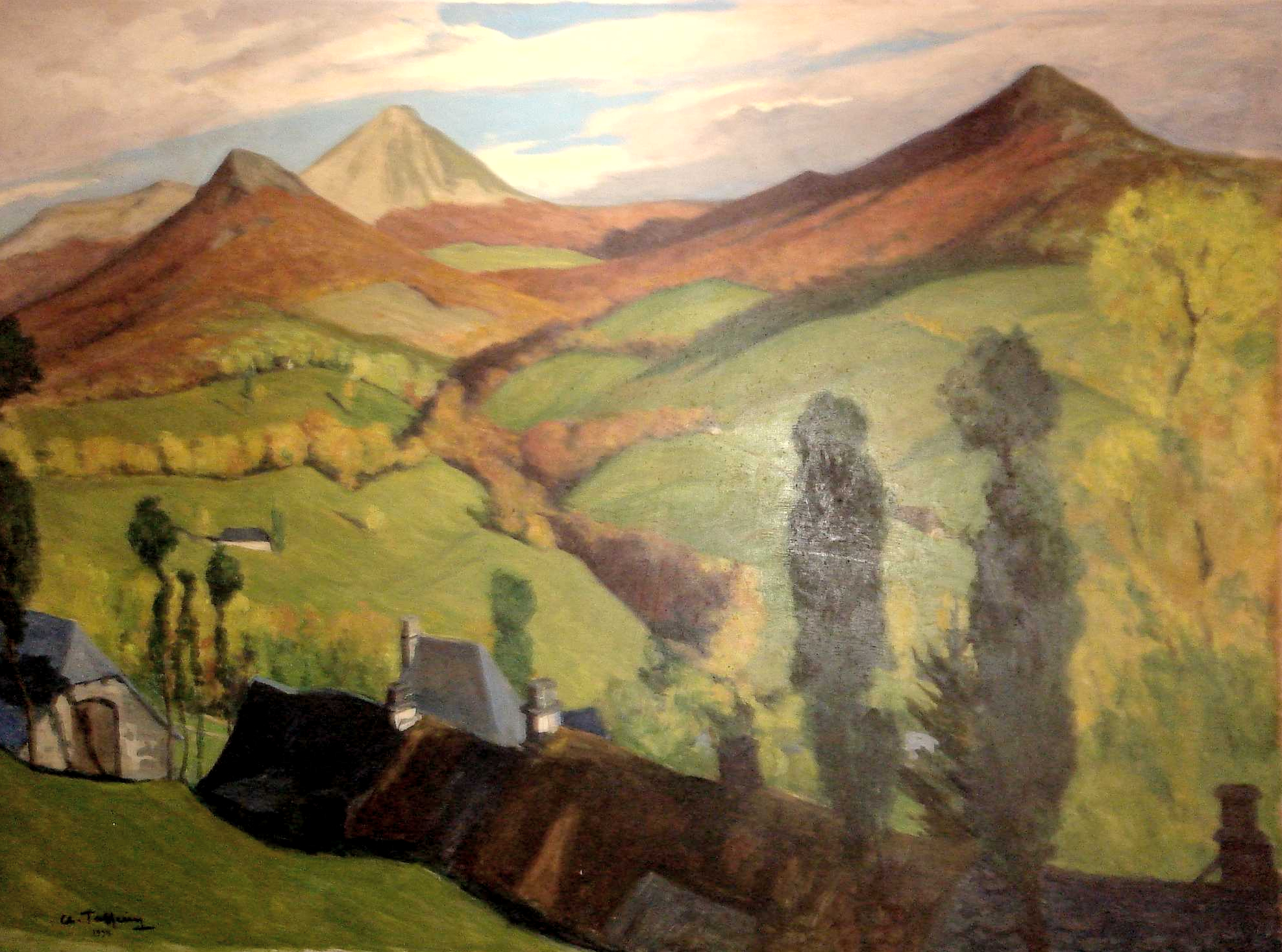 Signé Charles Jaffeux (1902-1941), Vue des Monts d'Auvergne, œuvre non sourcée, localisation inconnue.